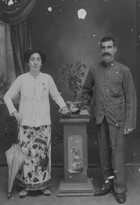 Kabinetfoto. Portret van een echtpaar, waarvan de vrouw in sarong en kabaja